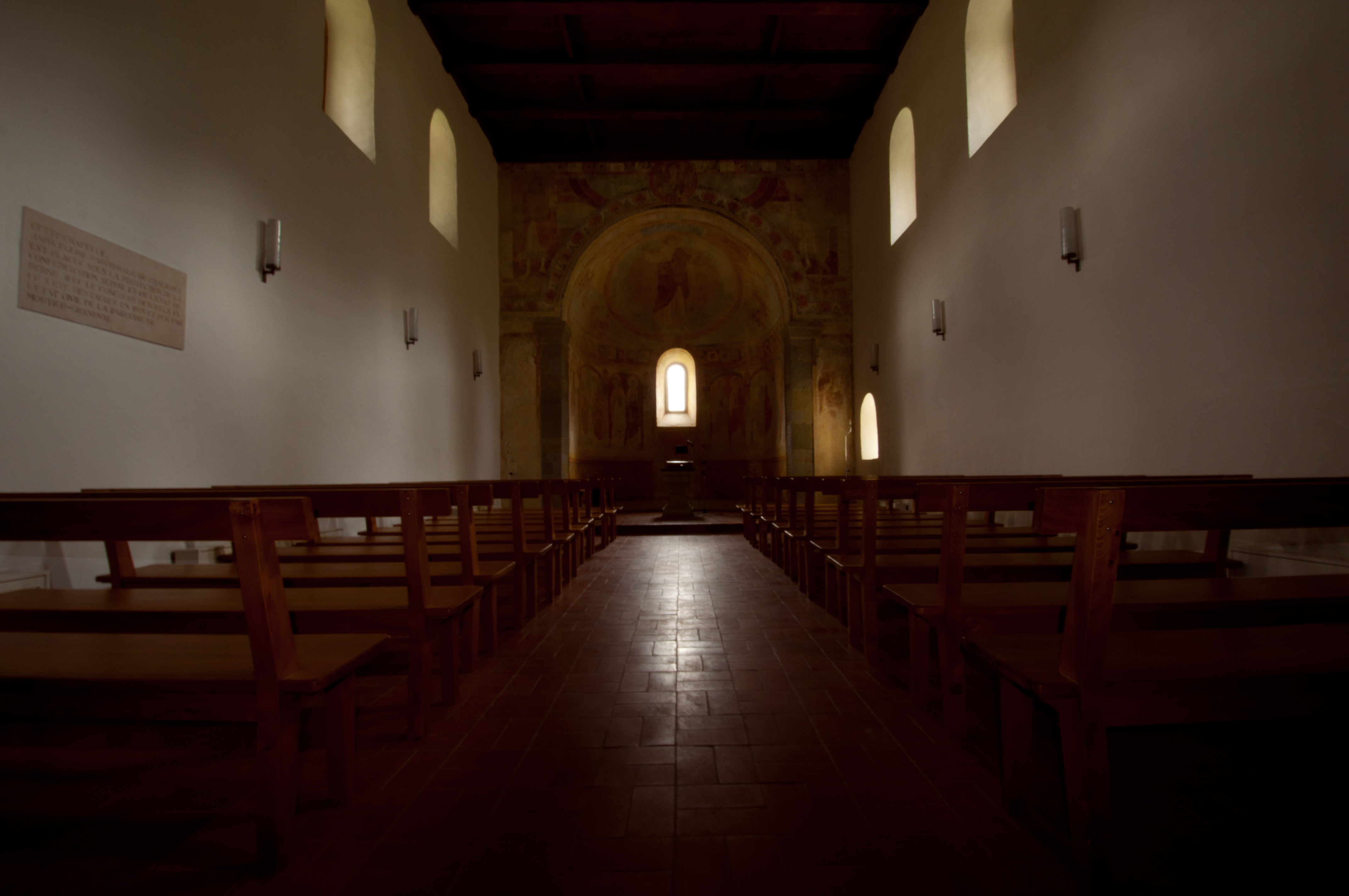 Kapelle von Chalières mit Friedhof (Intérieur)